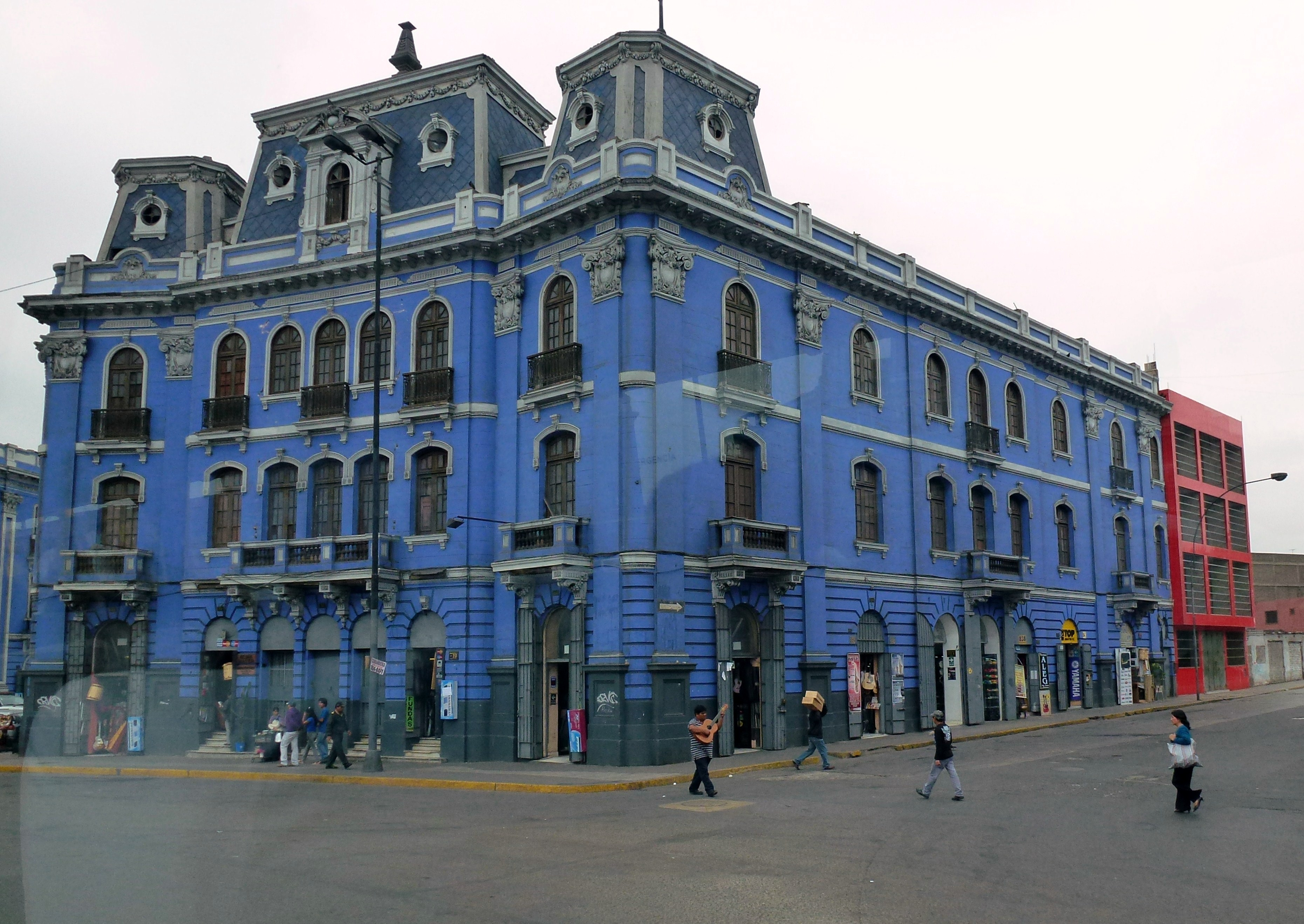 Lima Pérou